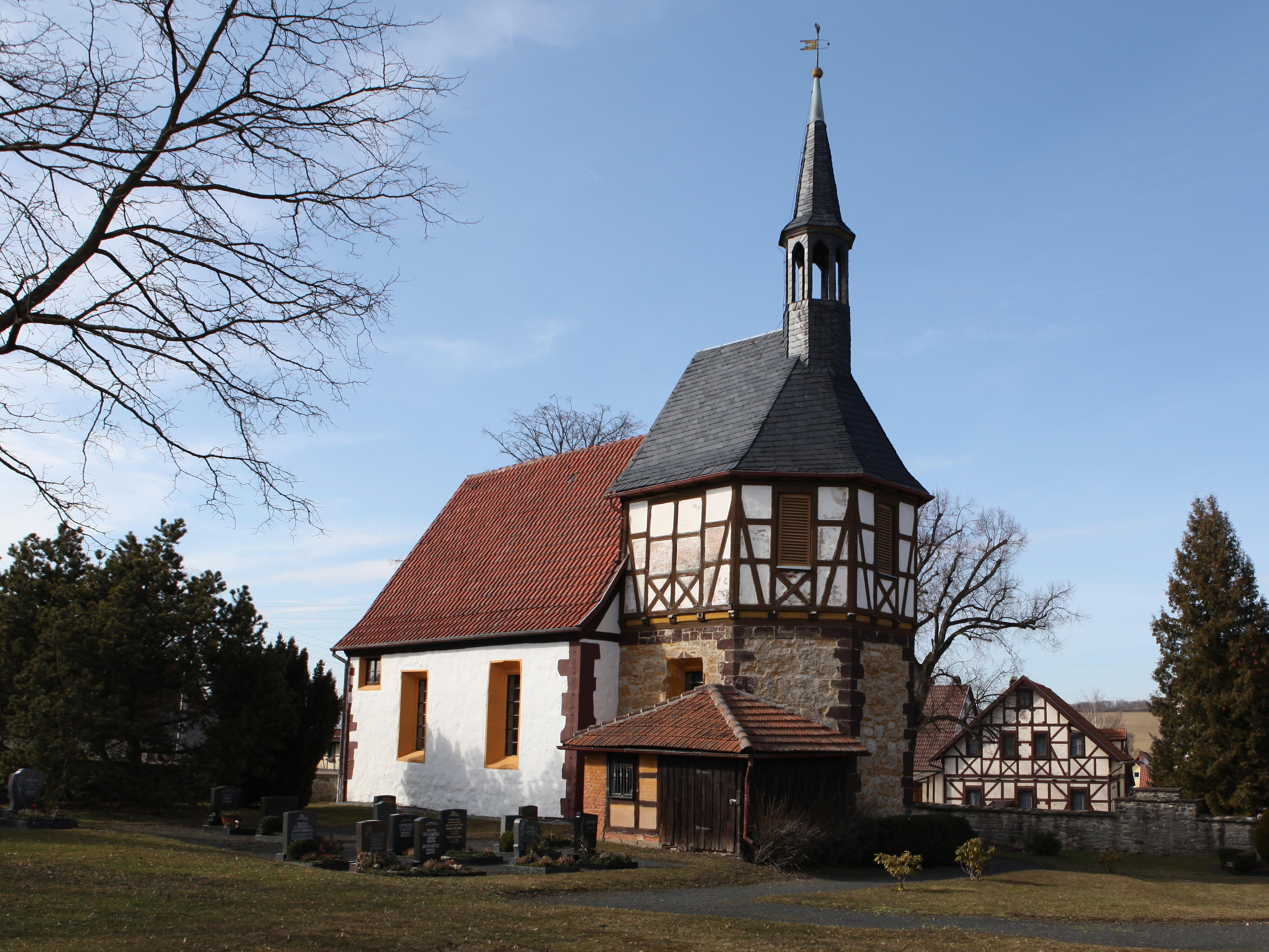 Evangelisch-lutherisch Kirche St. Valentin in Leimrieth, OT von Hildburghausen